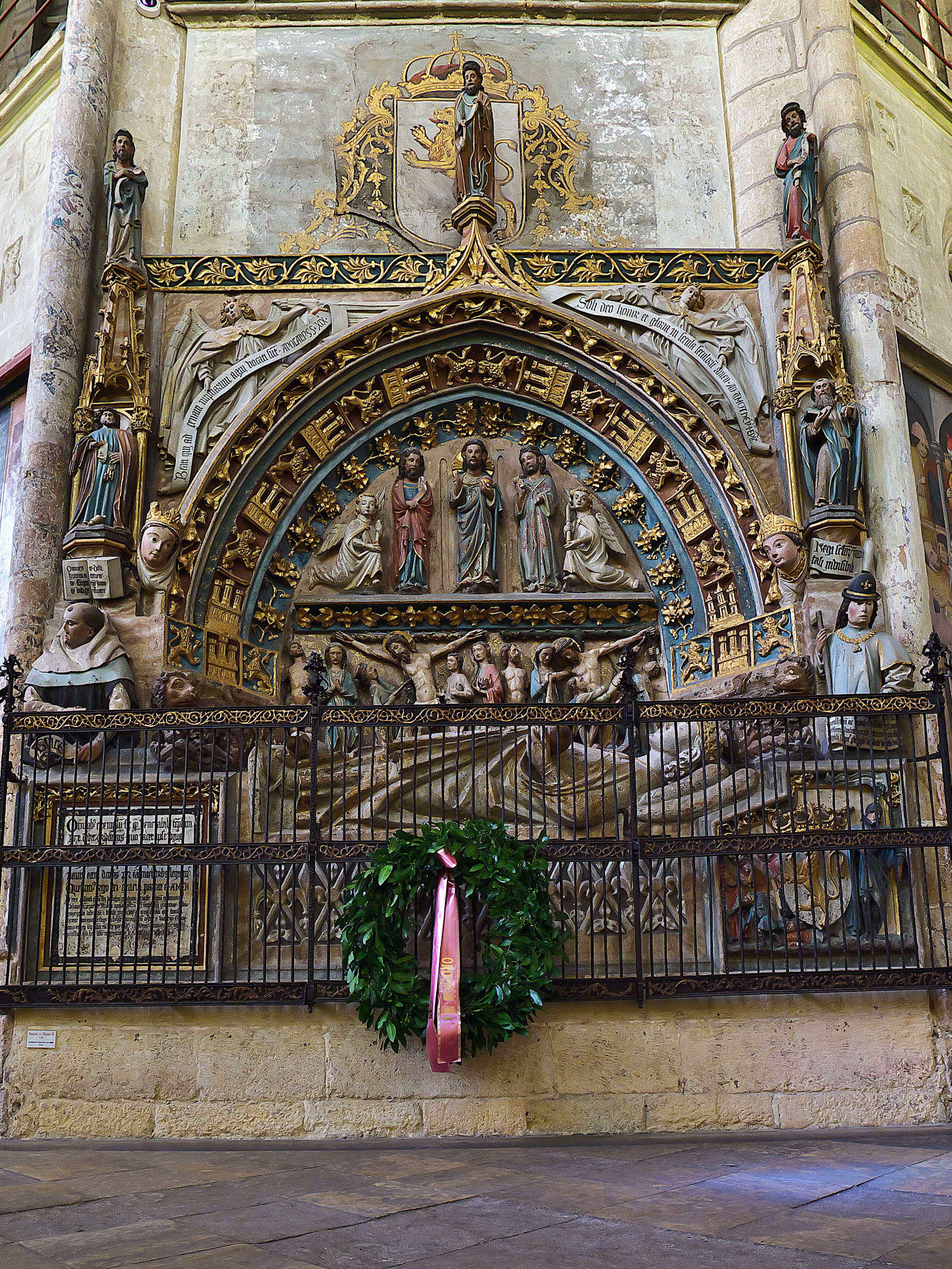 Girola de la Catedral de León. Sepulcro del rey Ordoño II de León († 924), que construyó la catedral románica.